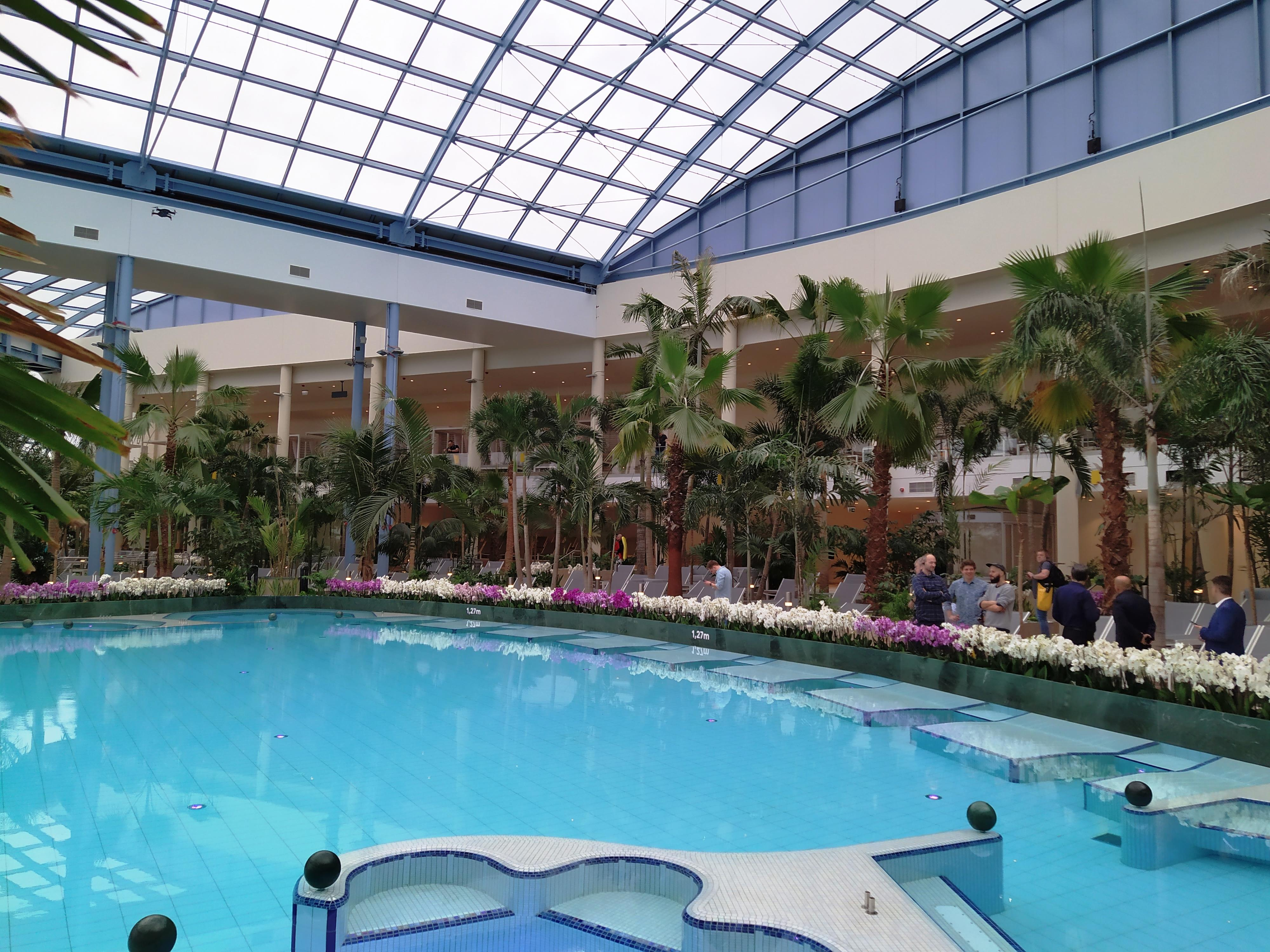 Suntago Wodny Świat - basen